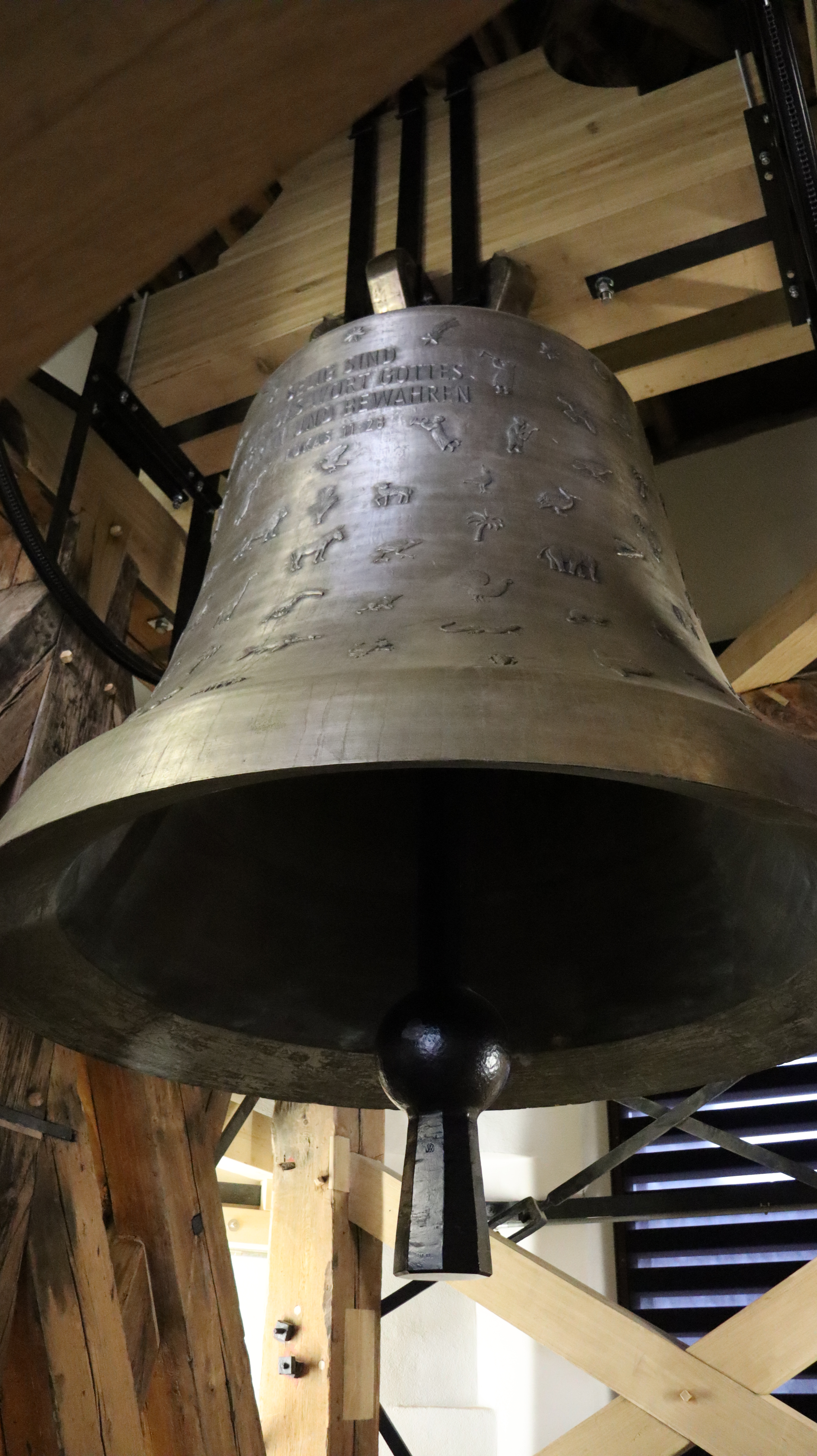 Die große Festglocke der Nikolaikirche zu Leipzig im Glockenstuhl.